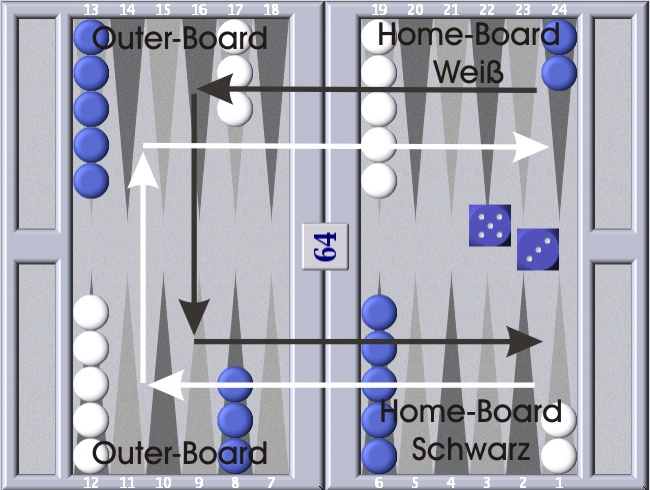 Backgammonbrett mit Startposition und Richtungspfeilen.